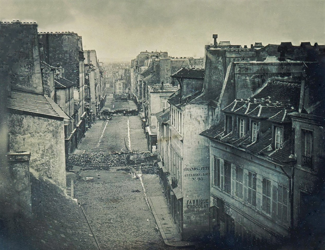 Barricades rue Saint-Maur, avant l'attaque des troupes du général Lamoricière, dimanche 25 juin 1848 à 7 h du matin. Technique et autres indications : daguerréotypes 11,2 x 14,5 cm Lieu de conservation : musée d'Orsay (Paris) ; Référence de l'image : 02CE10881/PHO2002-41 --- 02CE10879/PHO 2002-42